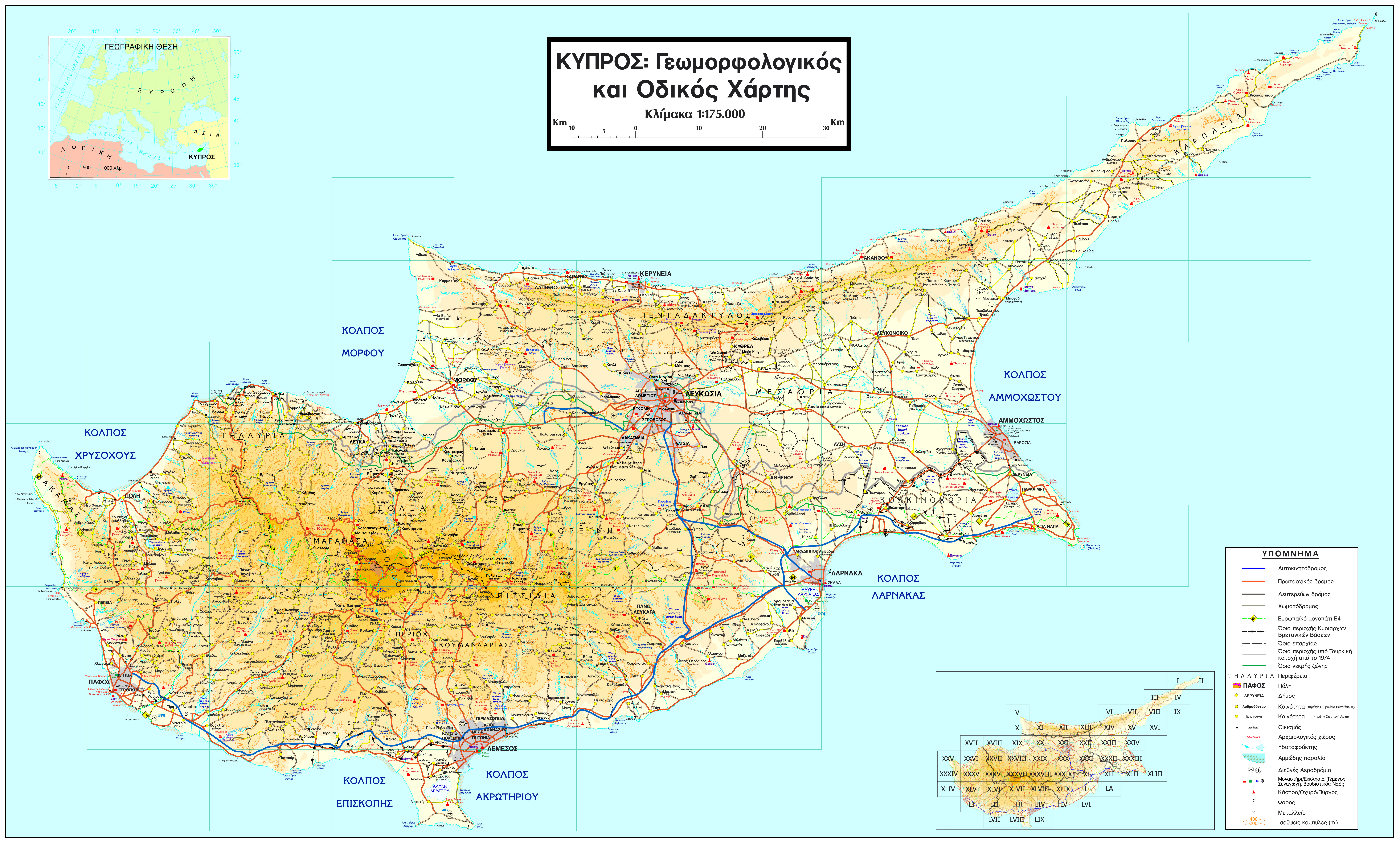 Πλήρης γεωμορφολογικός και οδικός χάρτης της Κύπρου UTM projection, WGS84 datum Scales: Topography: 1:175.000